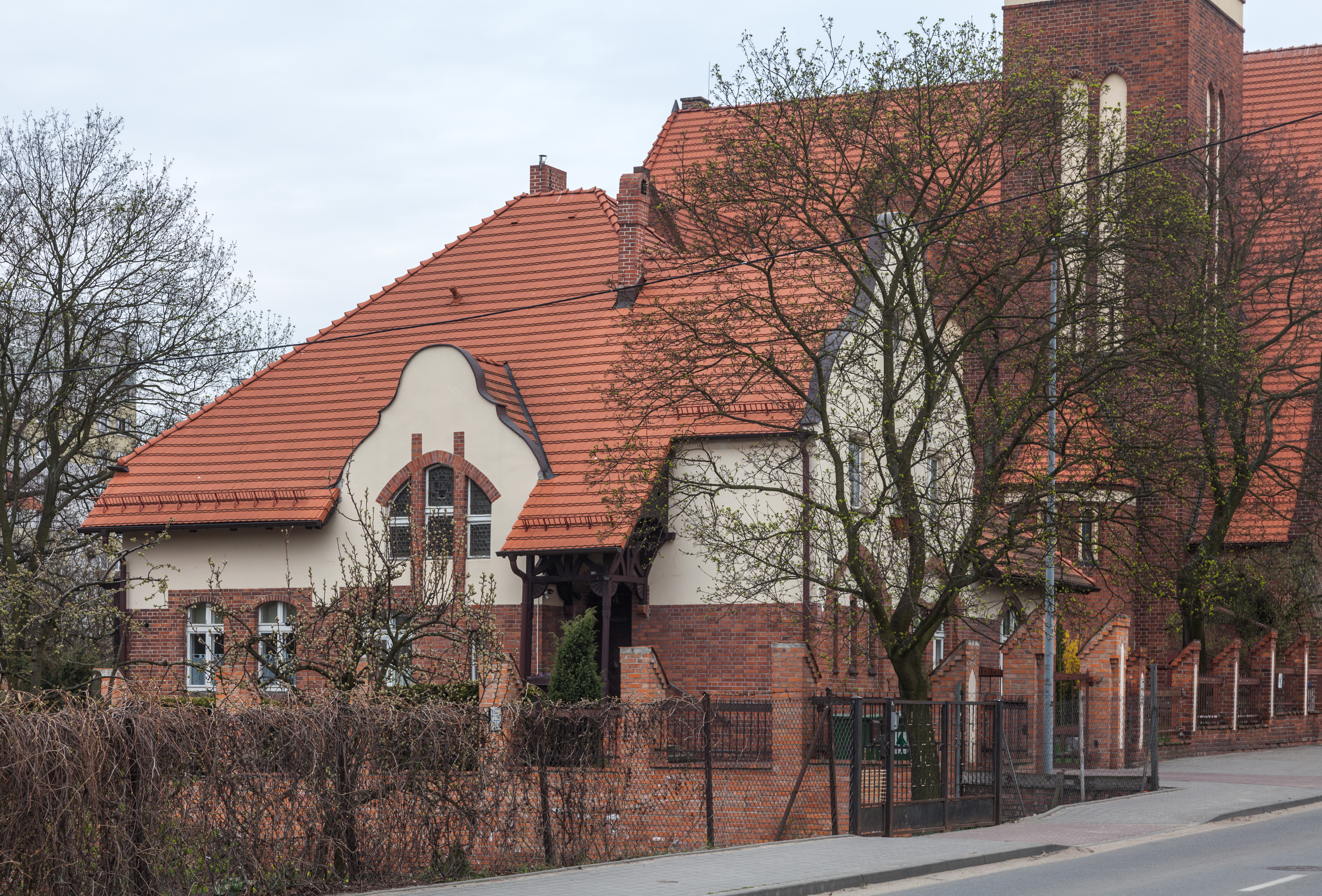 Toruń, Podgórna 76, dawna pastorówka, obecnie plebania kościoła Matki Boskiej Zwycięskiej i św. Jerzego.